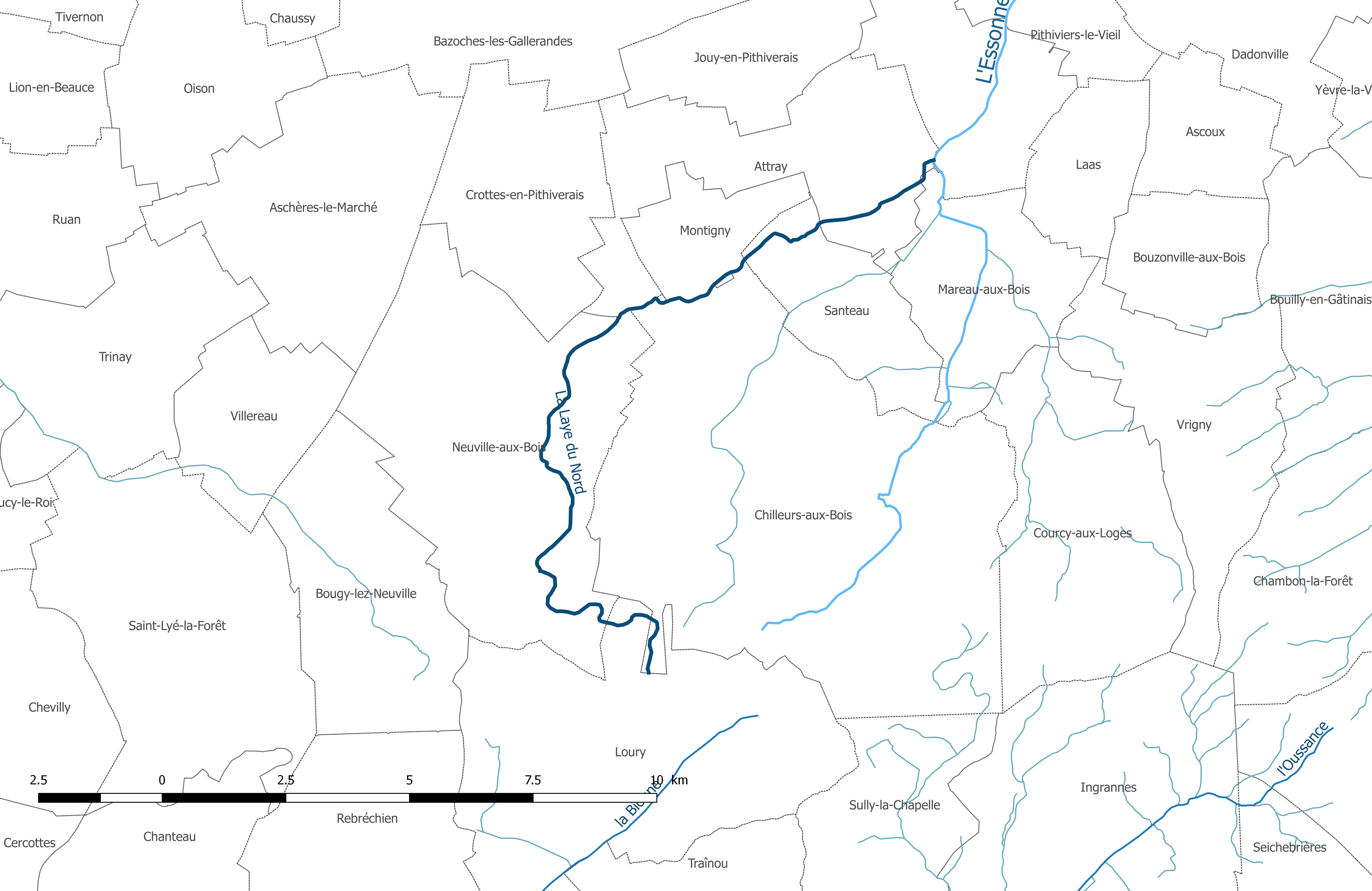 Carte du cours d'eau "la Laye du Nord" et de ses affluents, dans le département du Loiret.